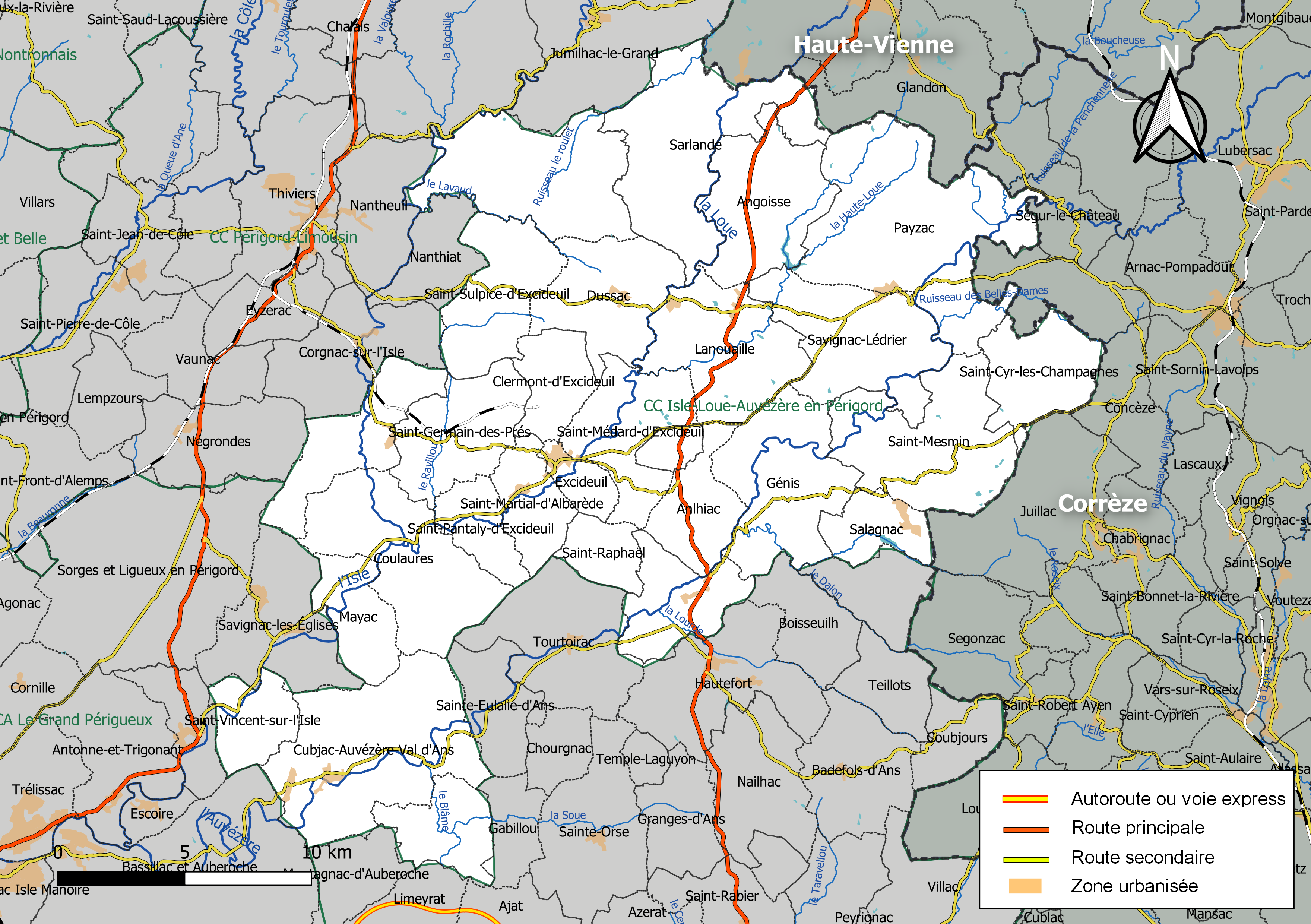 Carte géographique de la Communauté de communes Isle-Loue-Auvézère en Périgord, département de la Dordogne, France. Composition au 1er janvier 2019.